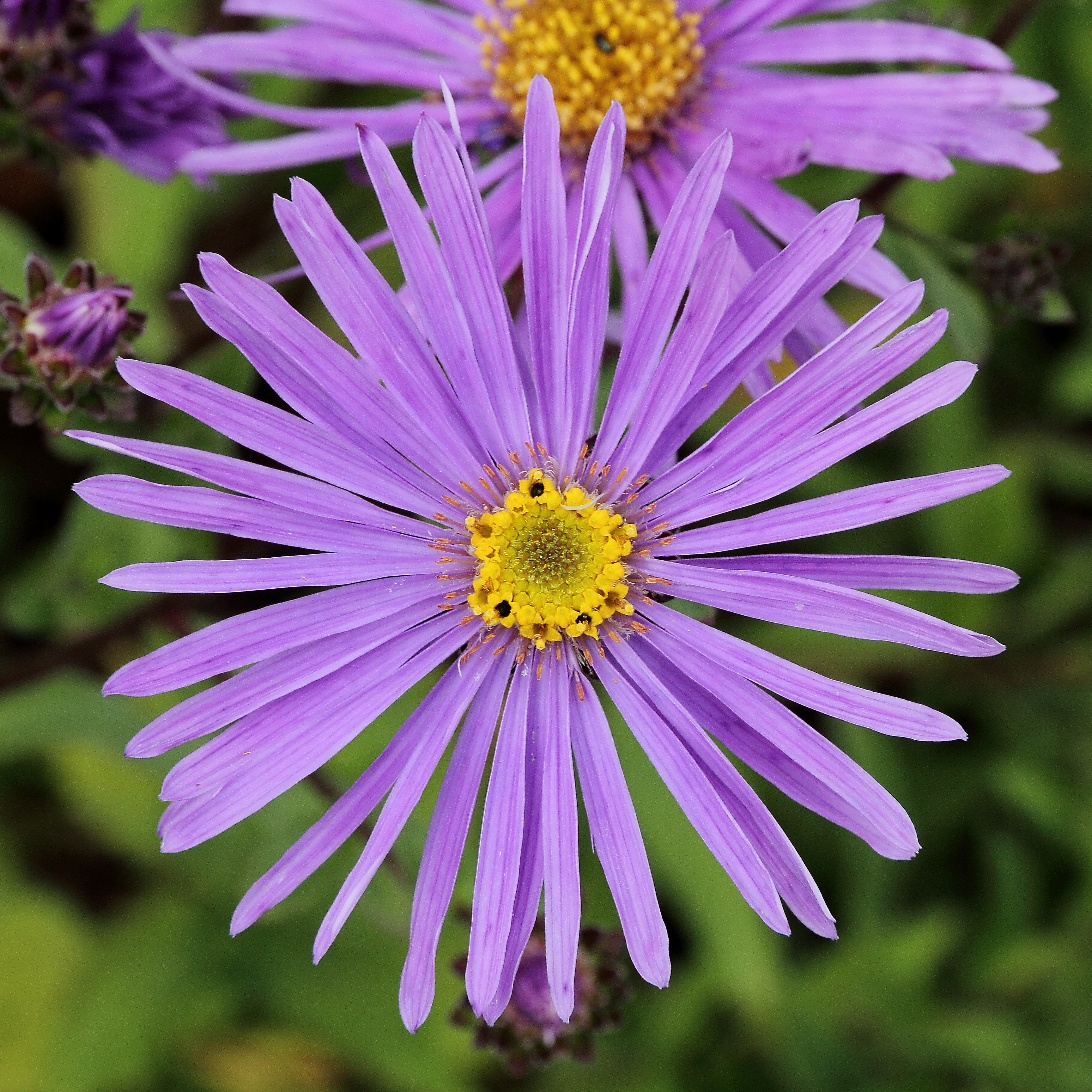 Aster amellus i Västerås botaniska trädgård.